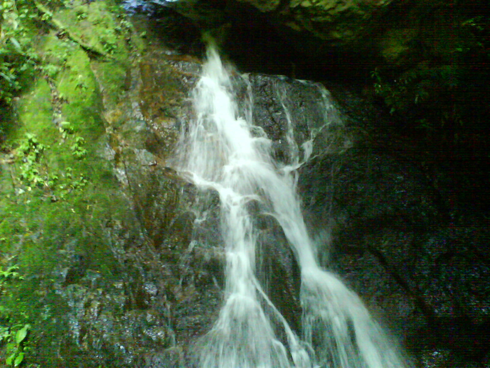 para refrescarte,nada mejor